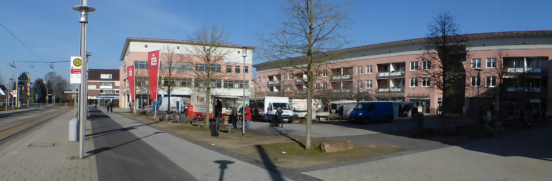 Stöckheimer Markt mit Wochenmarkt, Ansicht von Süden 2015